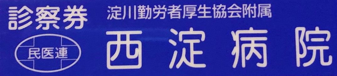 病院の運営法人の表示